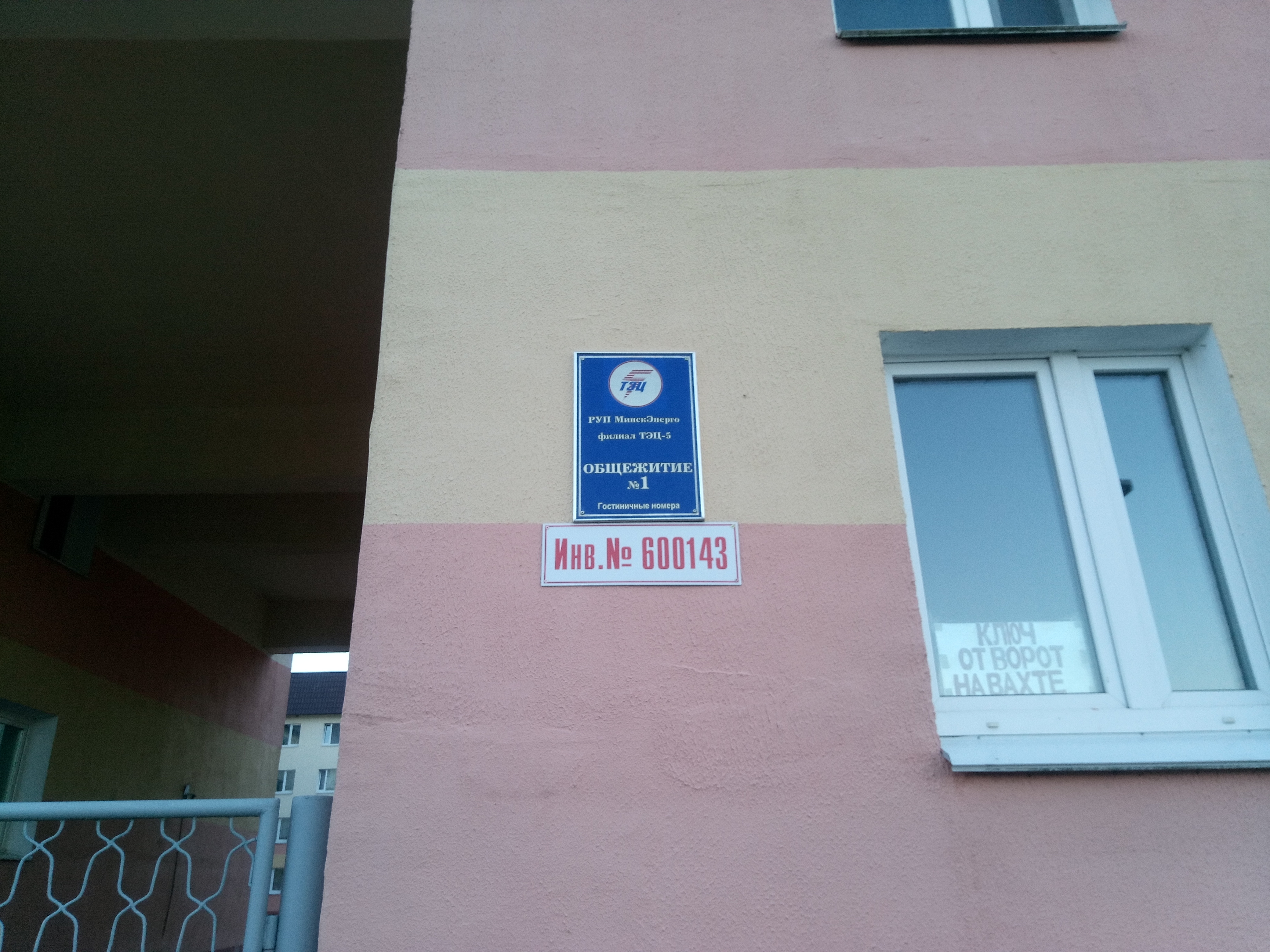 Інтэрнат №1 Мінскай ЦЭЦ-5 на вул. Чэпіка 7, таблічка.